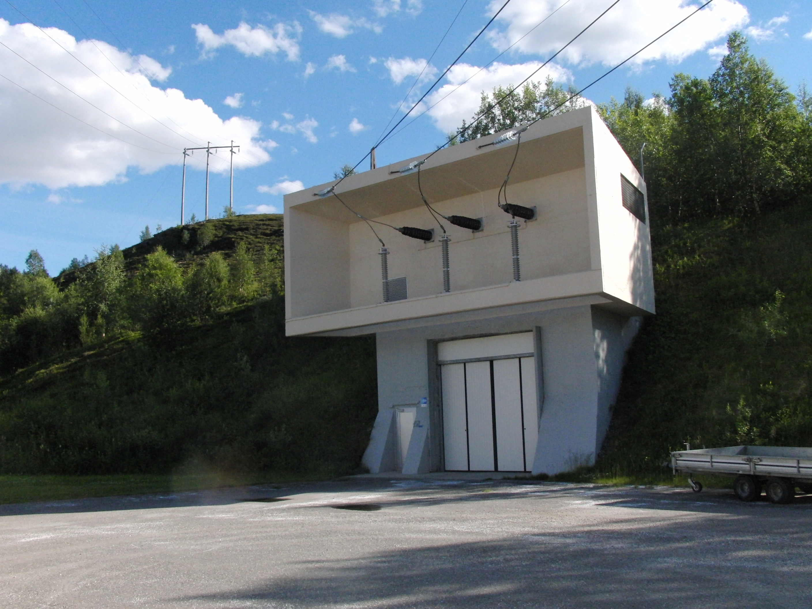 Fagerli kraftstasjon